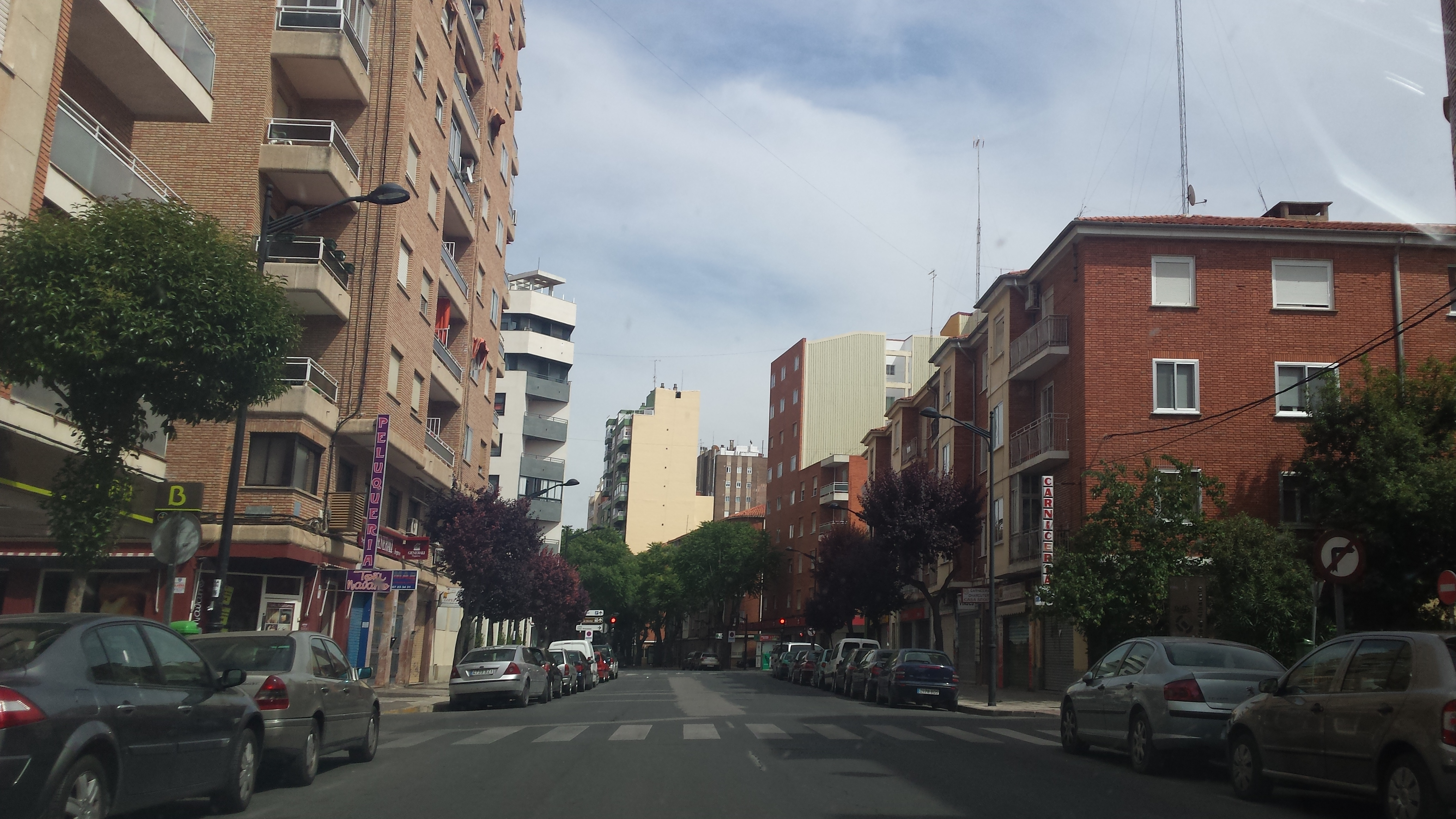 Calle Arquitecto Vandelvira. Albacete